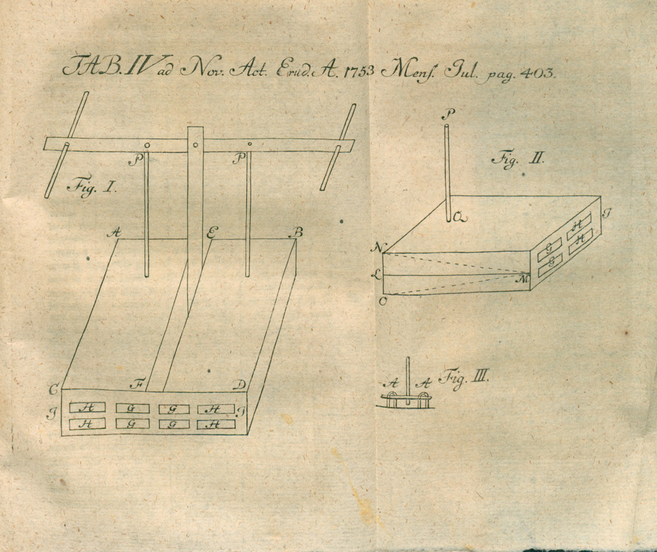 Illustration